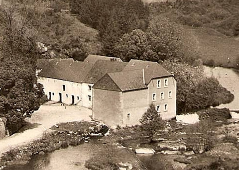 D'Bungerefer Millen an der Zäit.